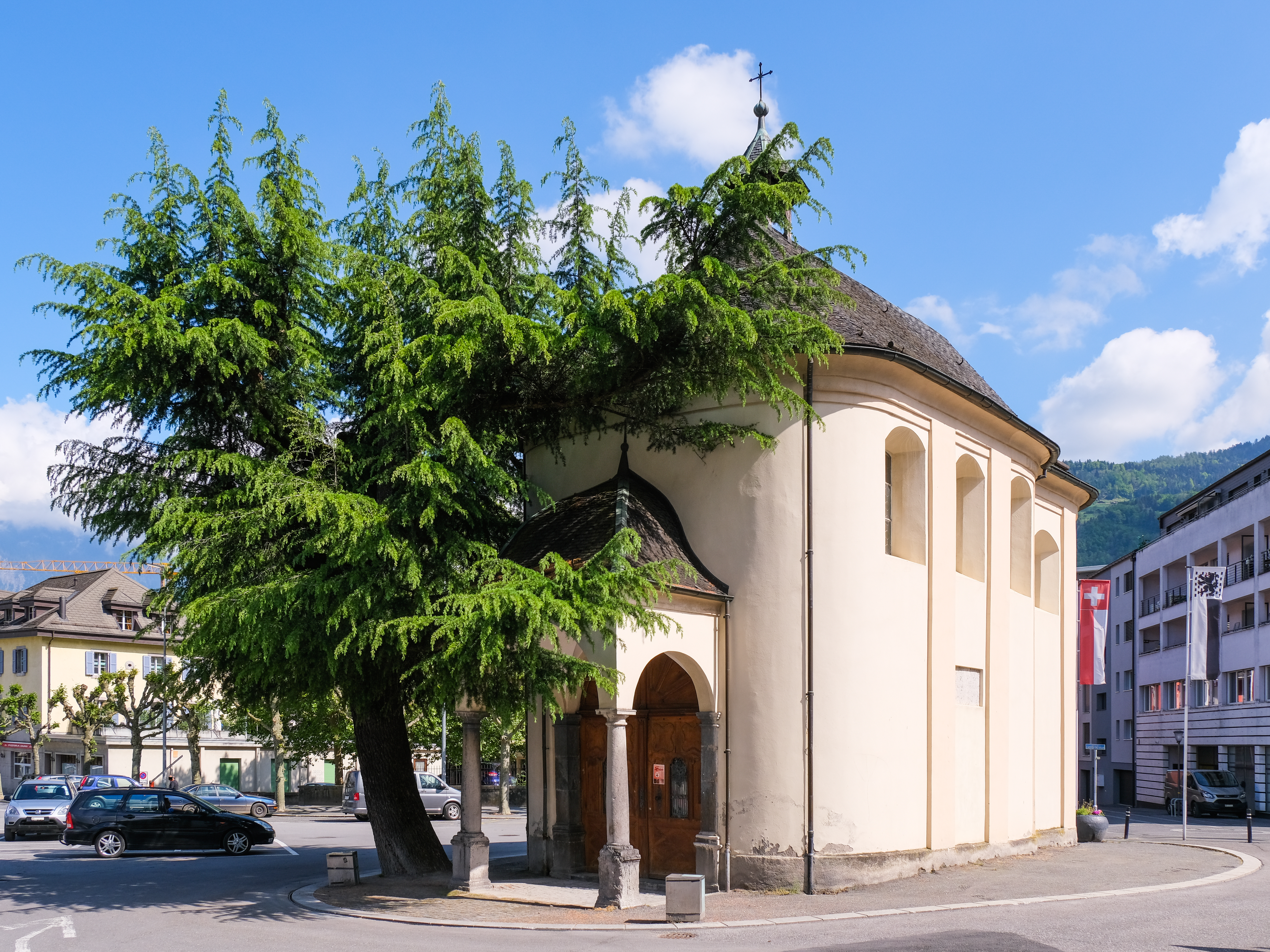 La chapelle du Pont à Monthey en 2020.